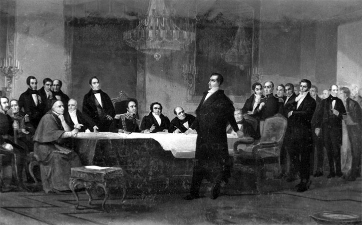 Diego Portales expone ante los notables en 1836, la situación de Chile ante la Confederación Perú-Boliviana. Obra perteneciente al Palacio de la Moneda, desaparecido para el Golpe de Estado del 11 de septiembre de 1973.